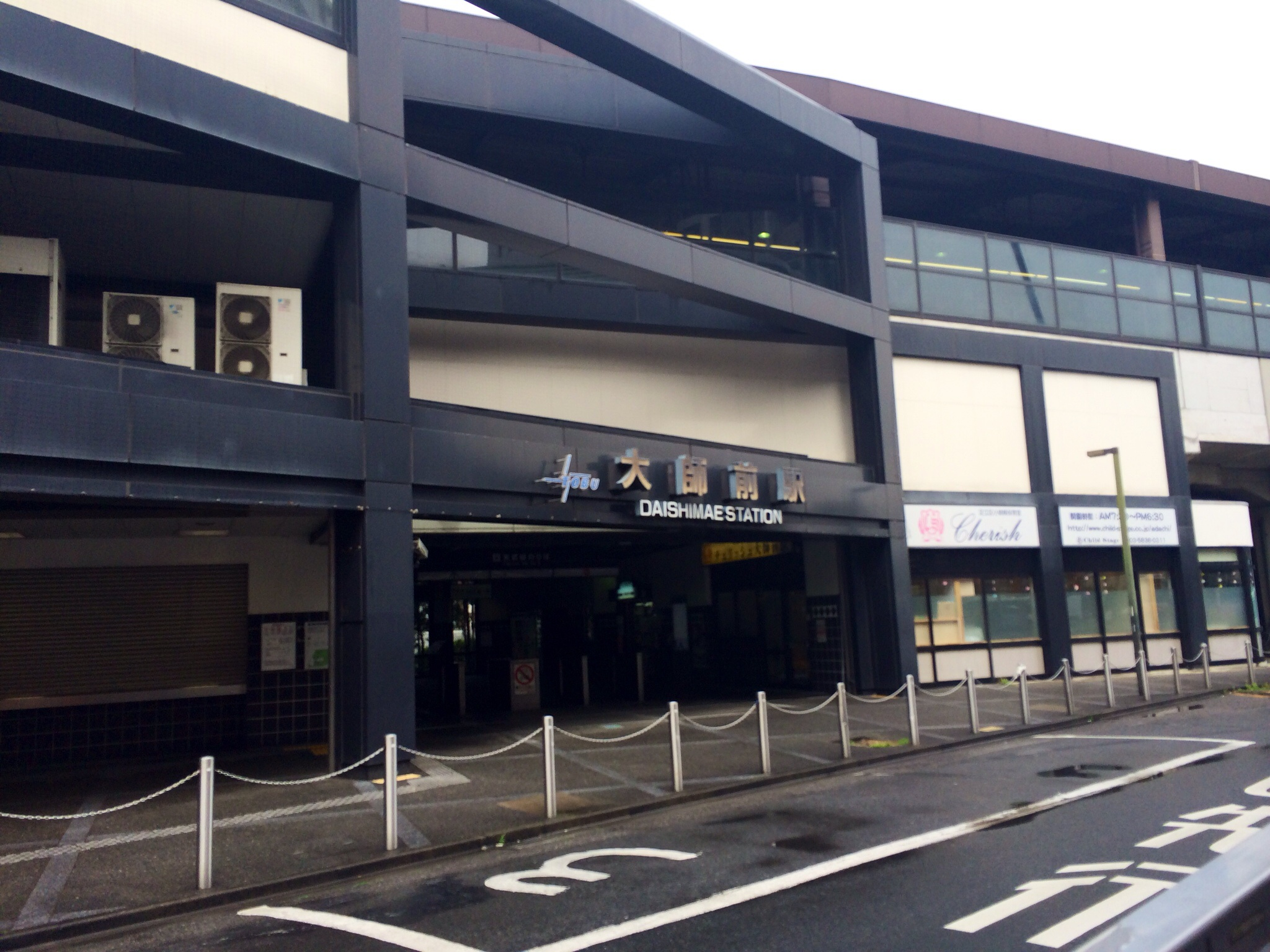 東武大師前駅